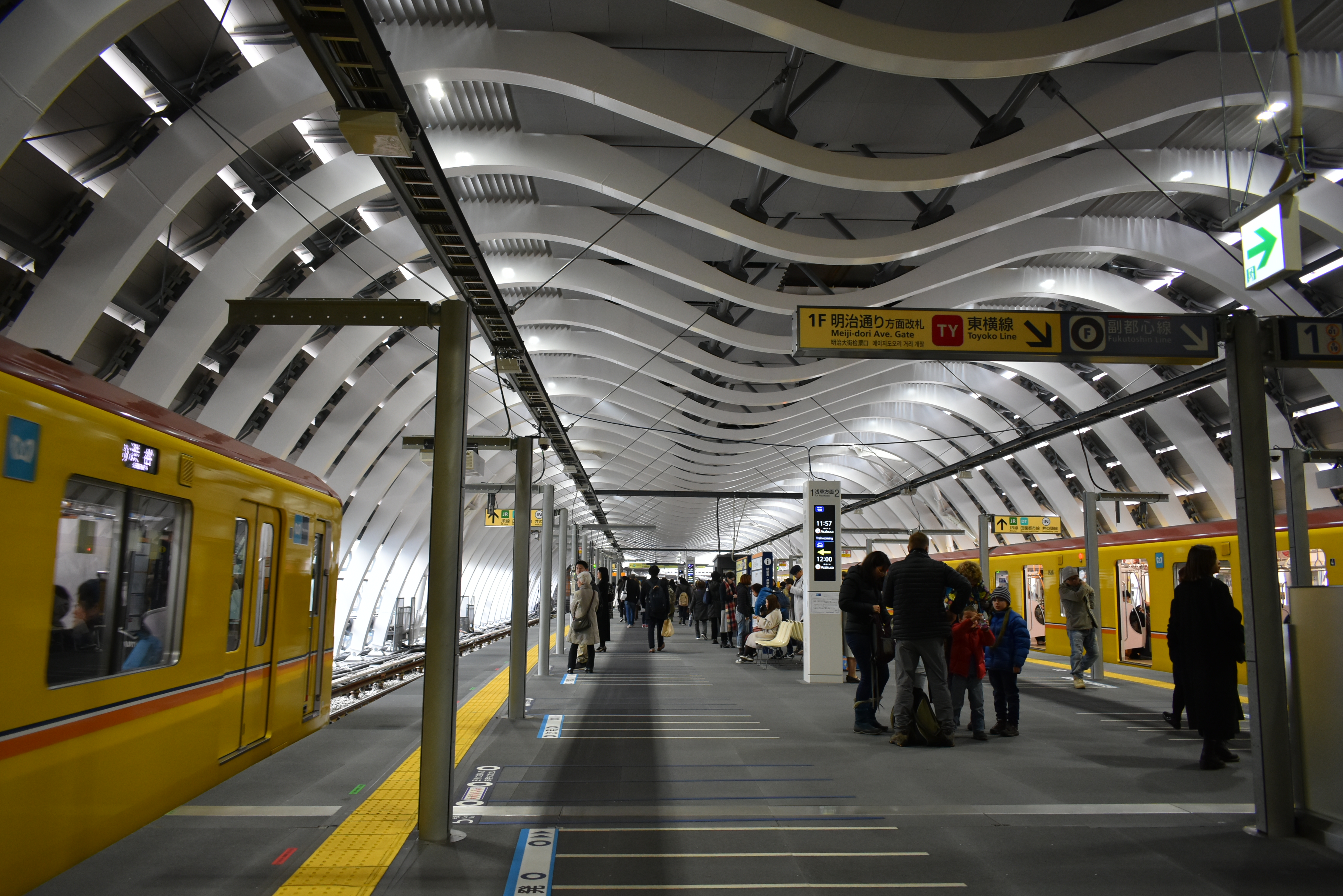 東京メトロ 銀座線 渋谷駅